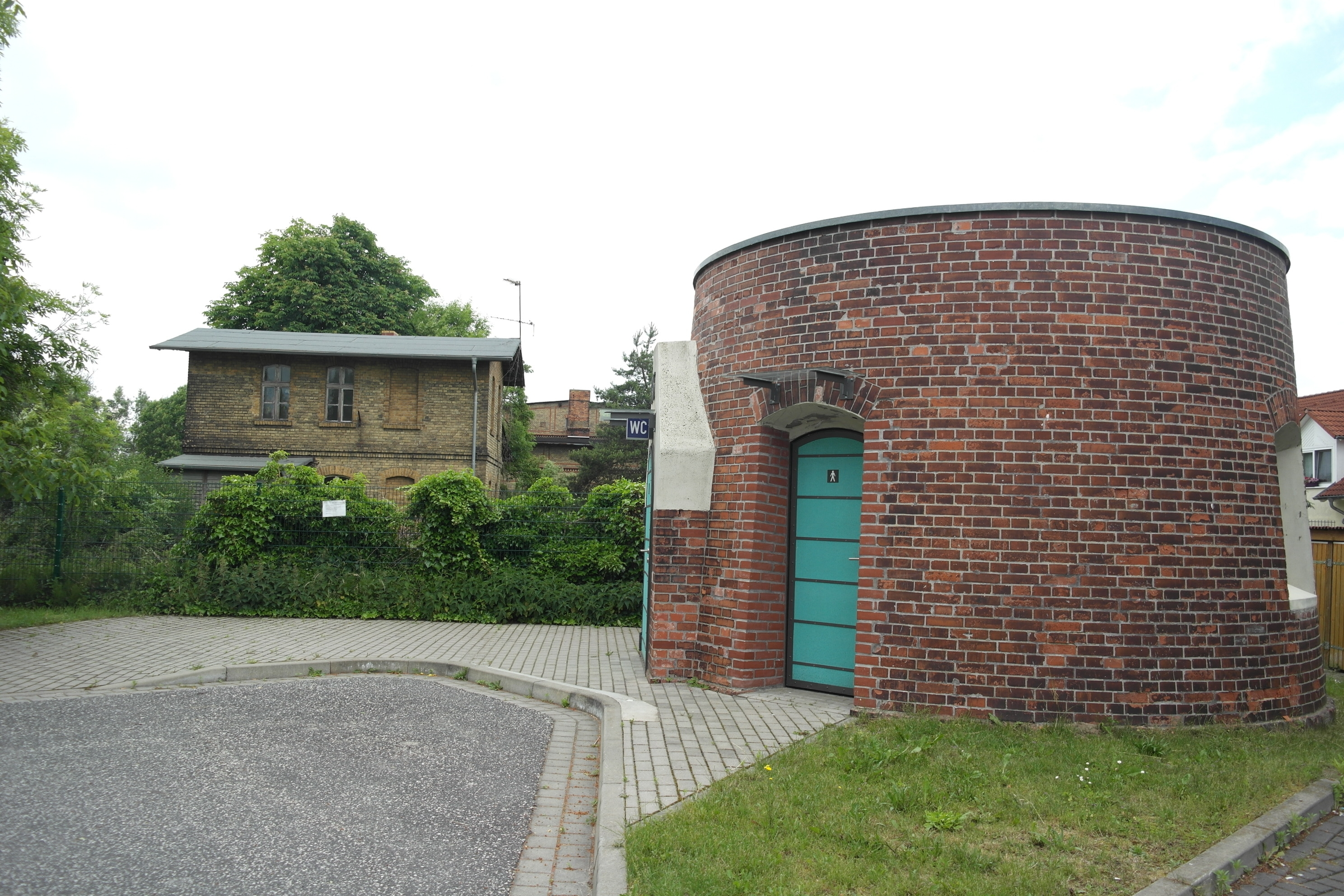 Bahnhof Zehdenick, Baudenkmal, Toilettenhäuschen